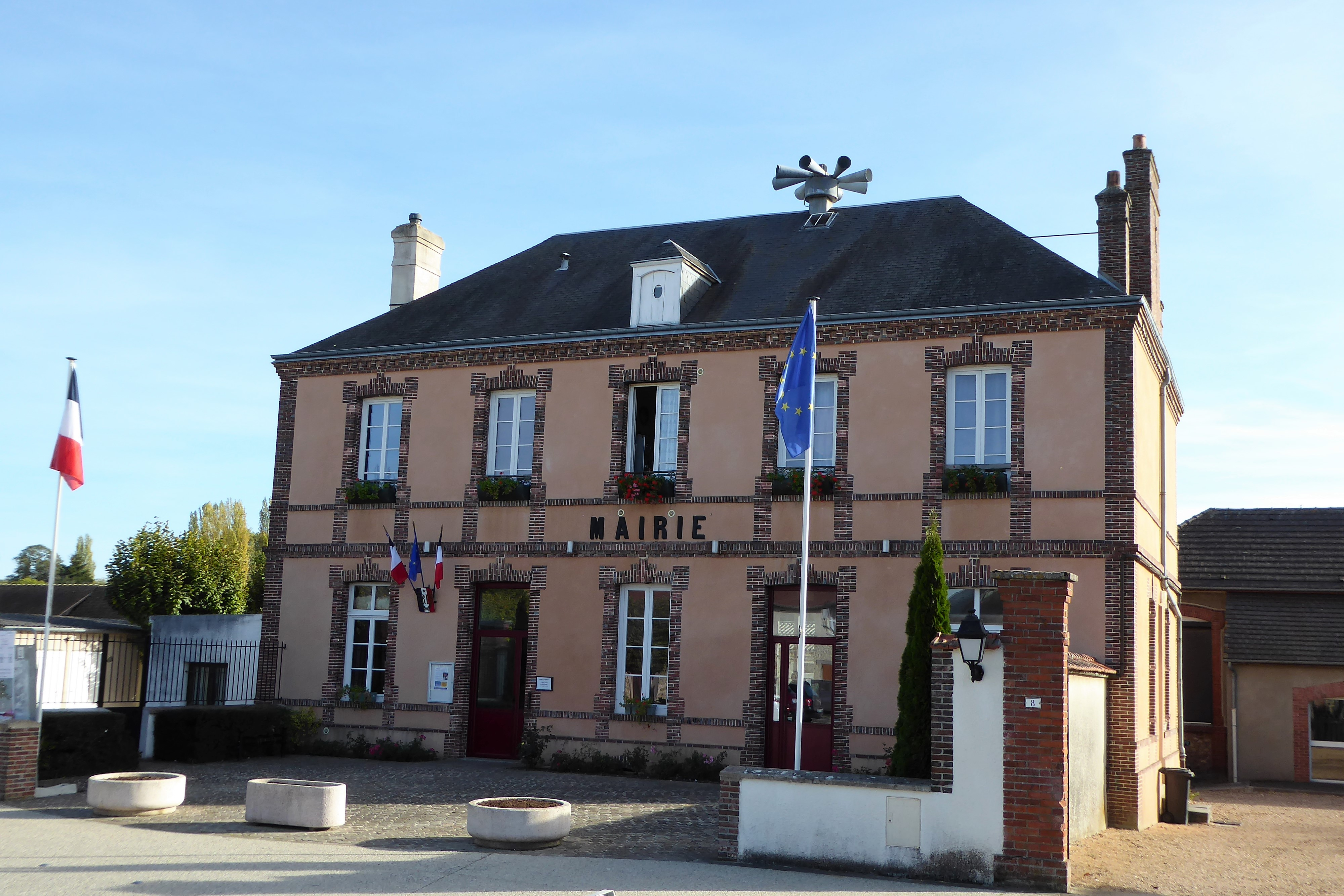 mairie de Faverolles, Eure-et-Loir, France.